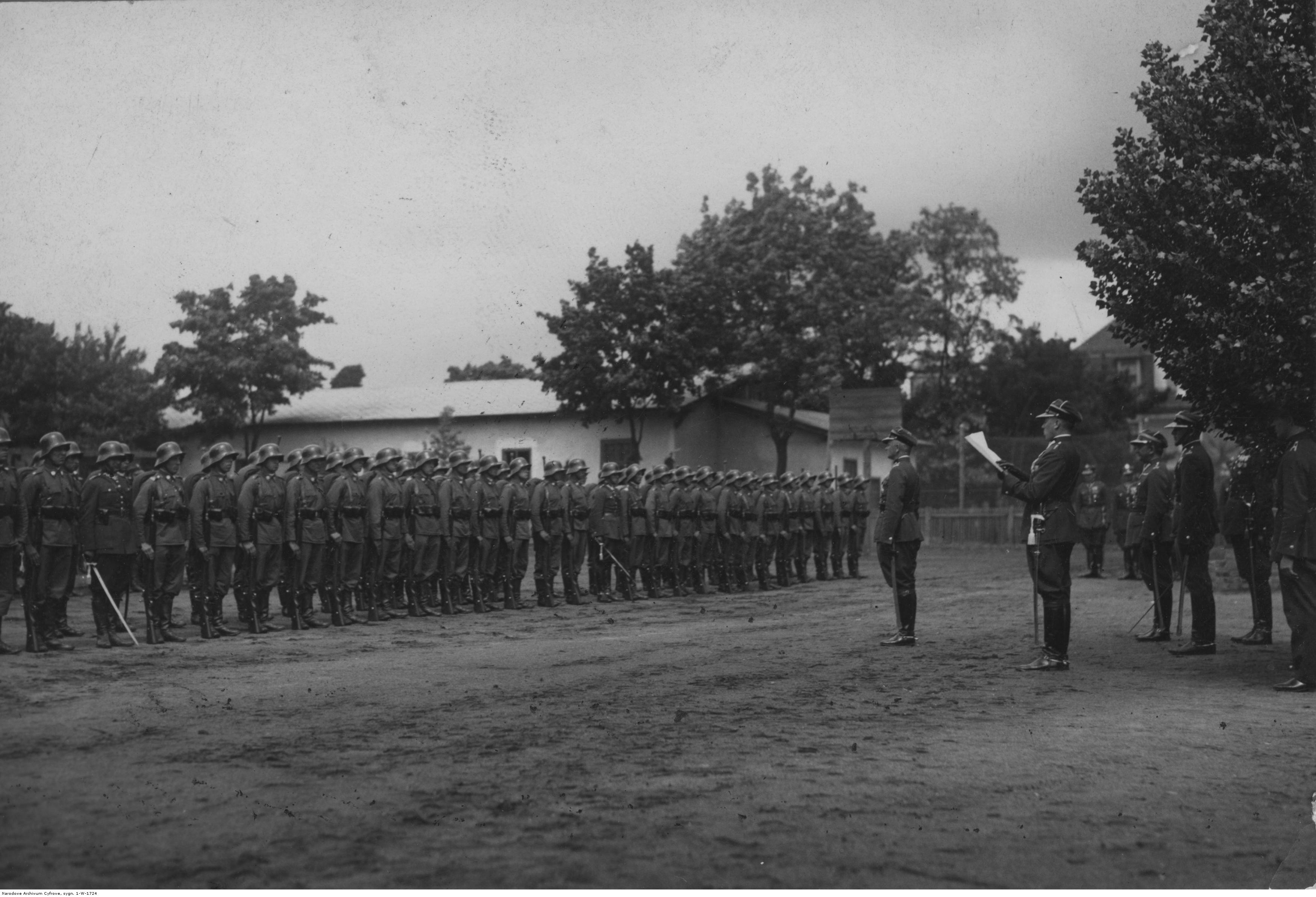 Święto 8 Batalionu Saperów w Toruniu. Odczytanie rozkazu nadającego grupie saperów wyższe szarże; czerwiec 1932. Koncern Ilustrowany Kurier Codzienny - Archiwum Ilustracji. Sygnatura: 1-W-1724